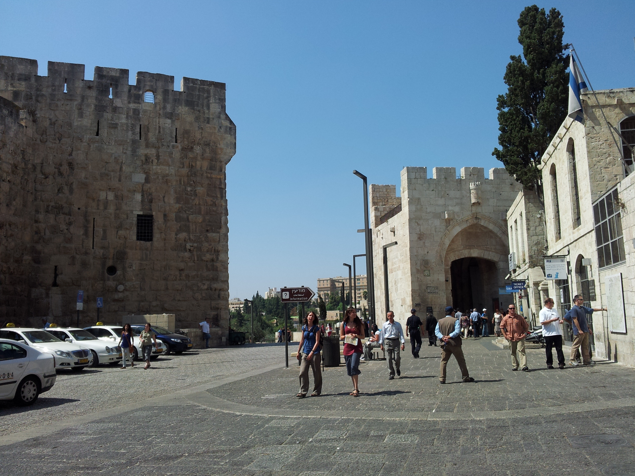 שער יפו ירושלים